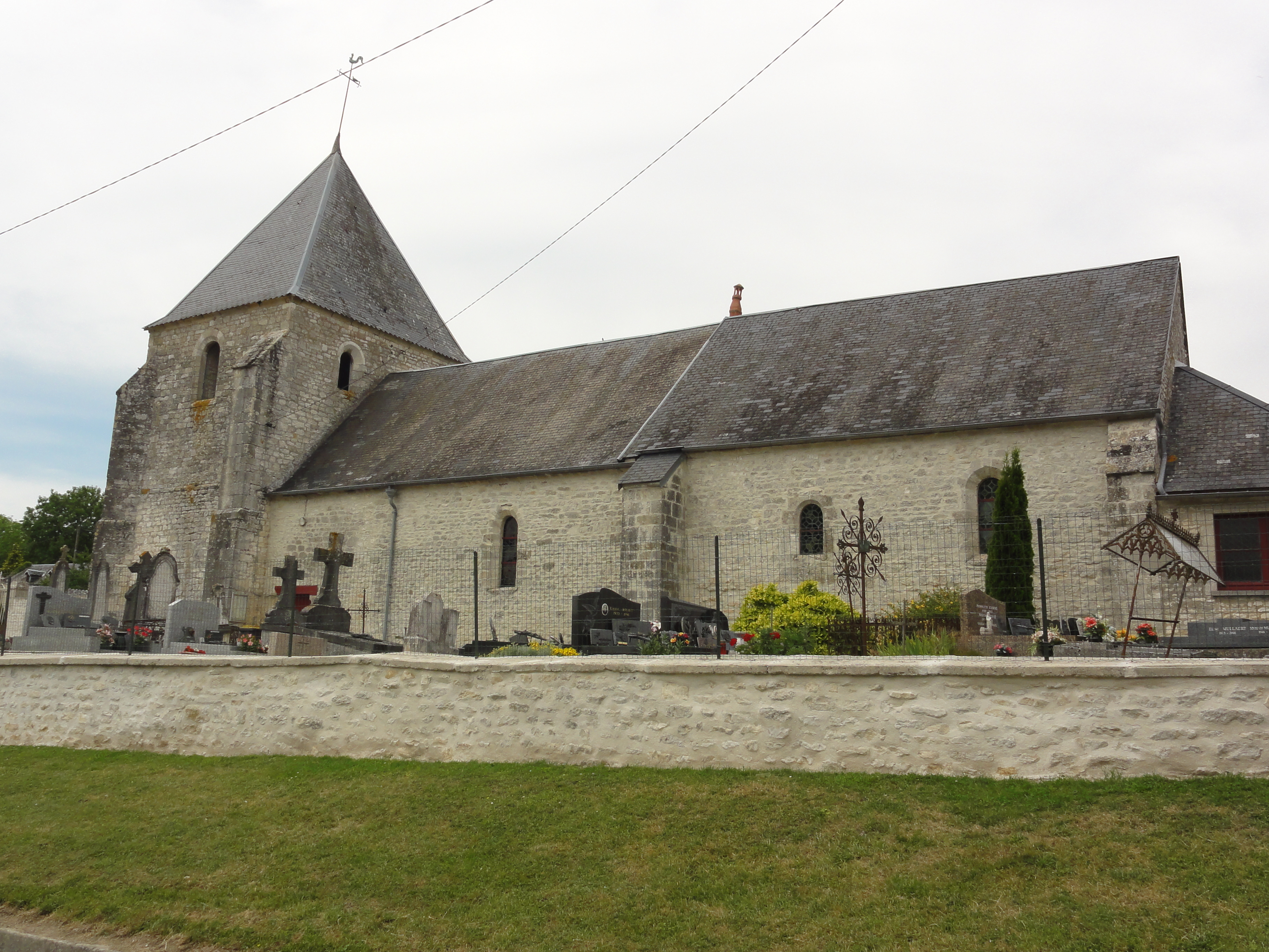 Sainte-Preuve (Aisne) église